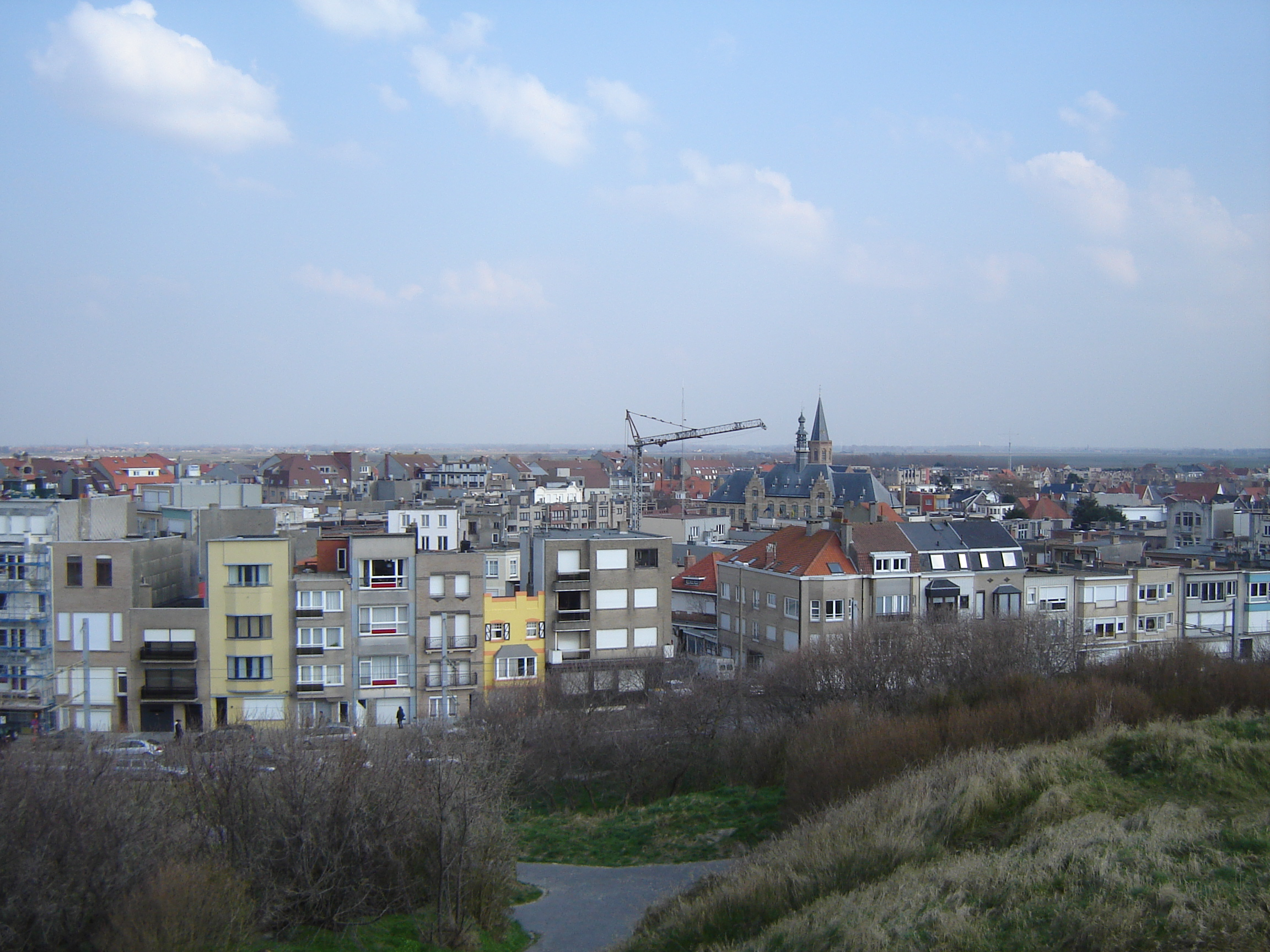 Uitzicht op Wenduine vanaf de Spioenkop View on Wenduine, seen from the Spioenkop. Wenduine, De Haan, West Flanders, Belgium